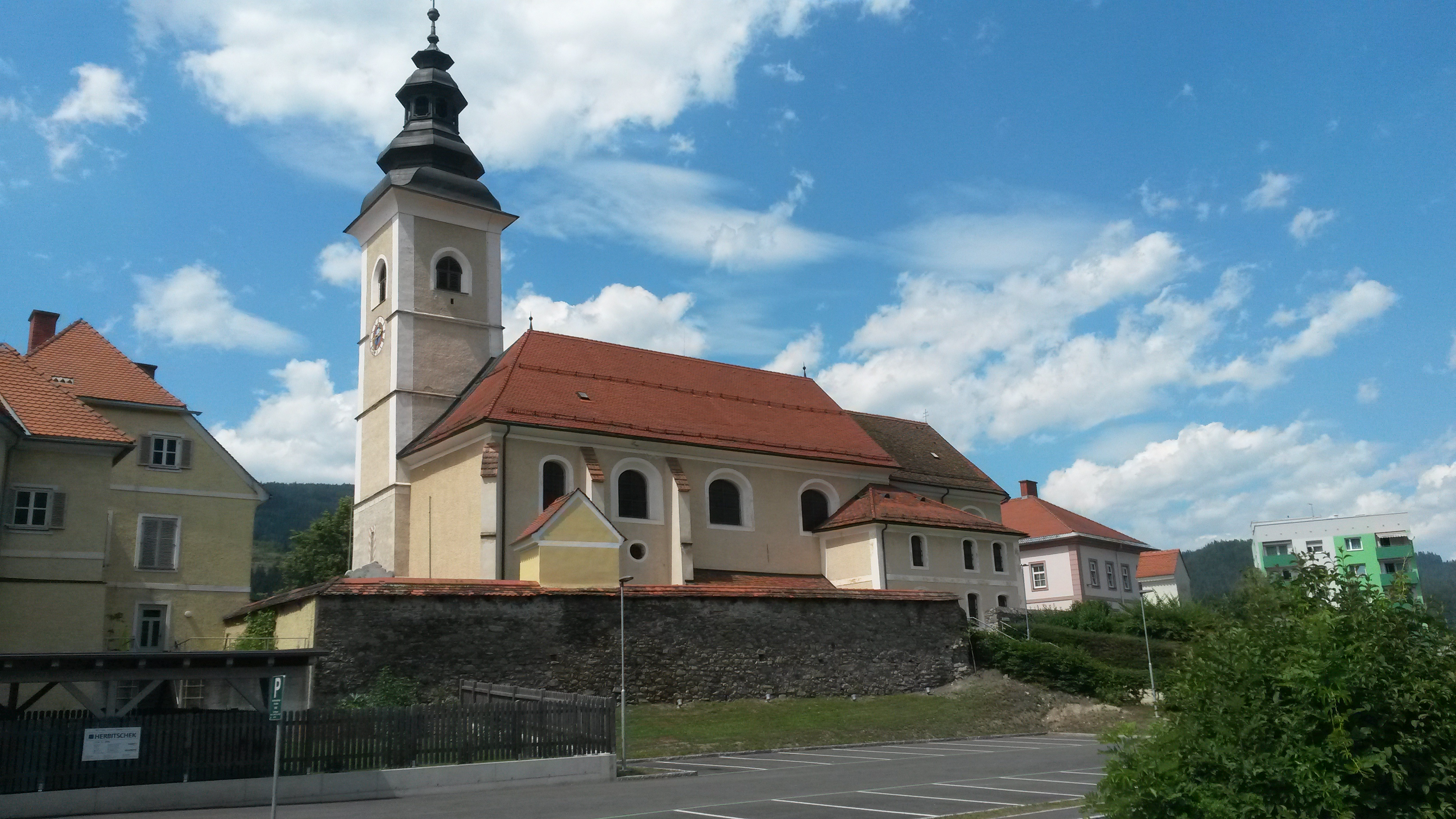 Kath. Pfarrkirche hl. Peter und Paul in Kindberg/Österreich. Davor die ebenfalls geschützte Kirchhofmauer.